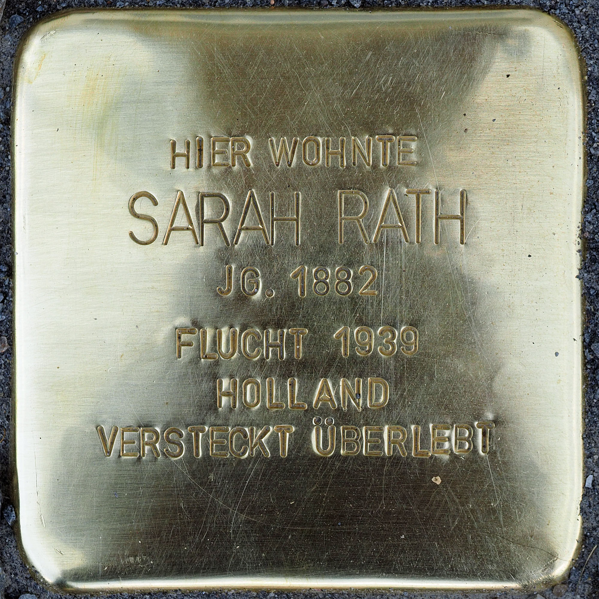 Stolpersteine Kempen: Rath, Sarah